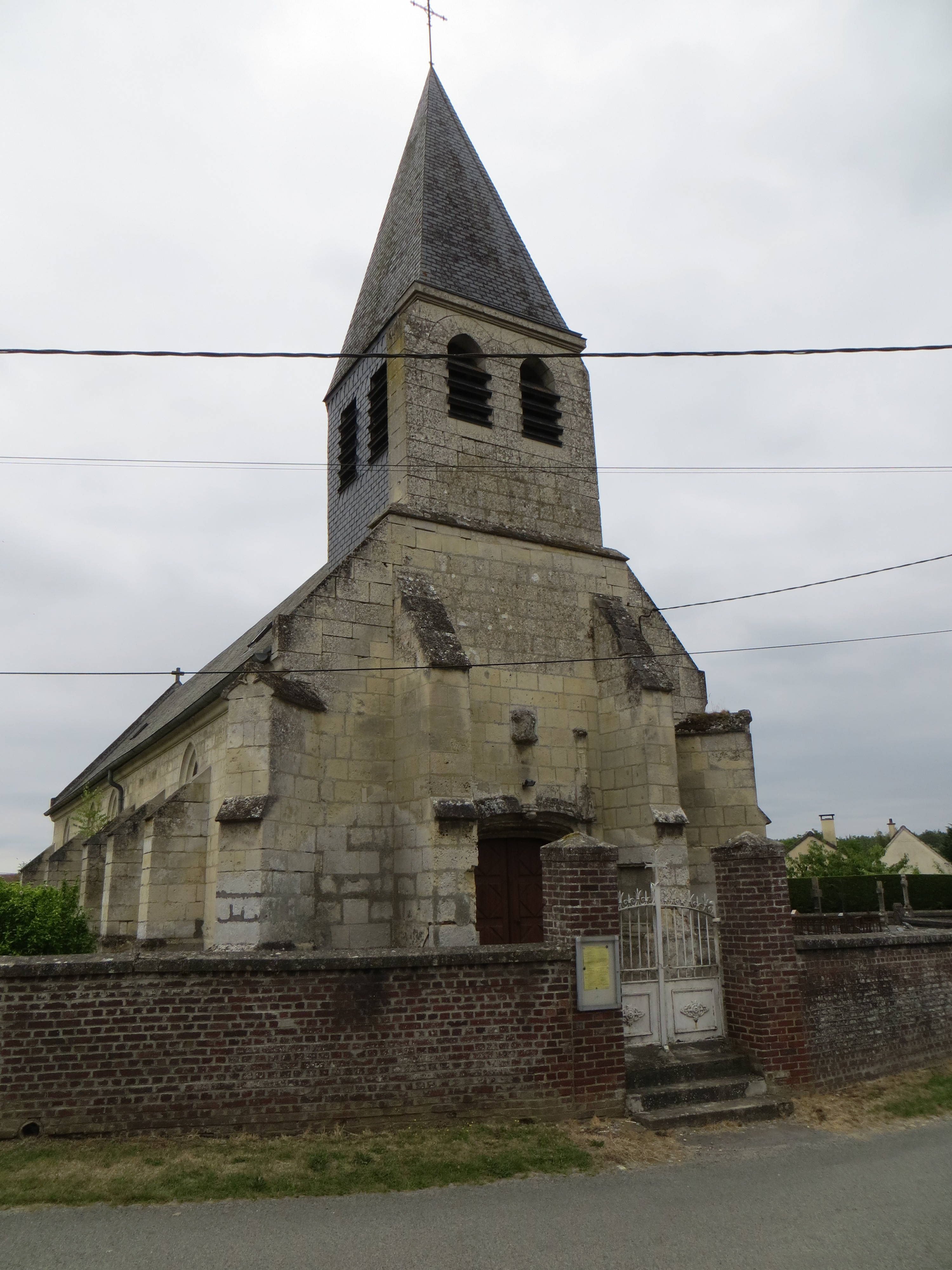 Vue générale de l'église